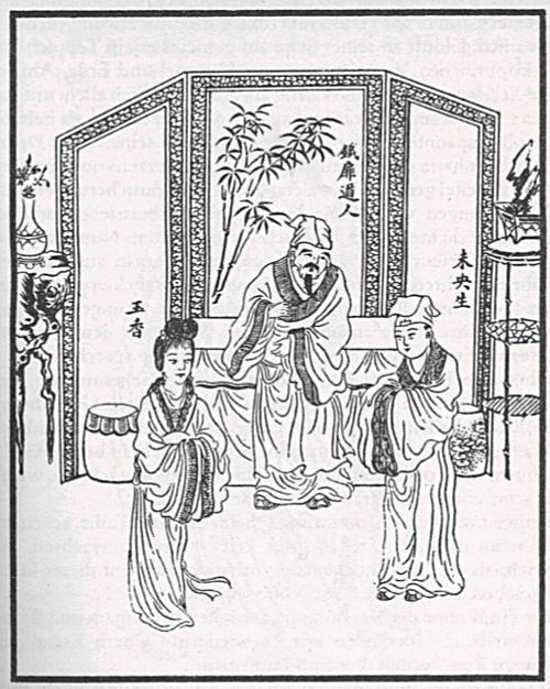 《肉蒲团》 1894年板木刻插图